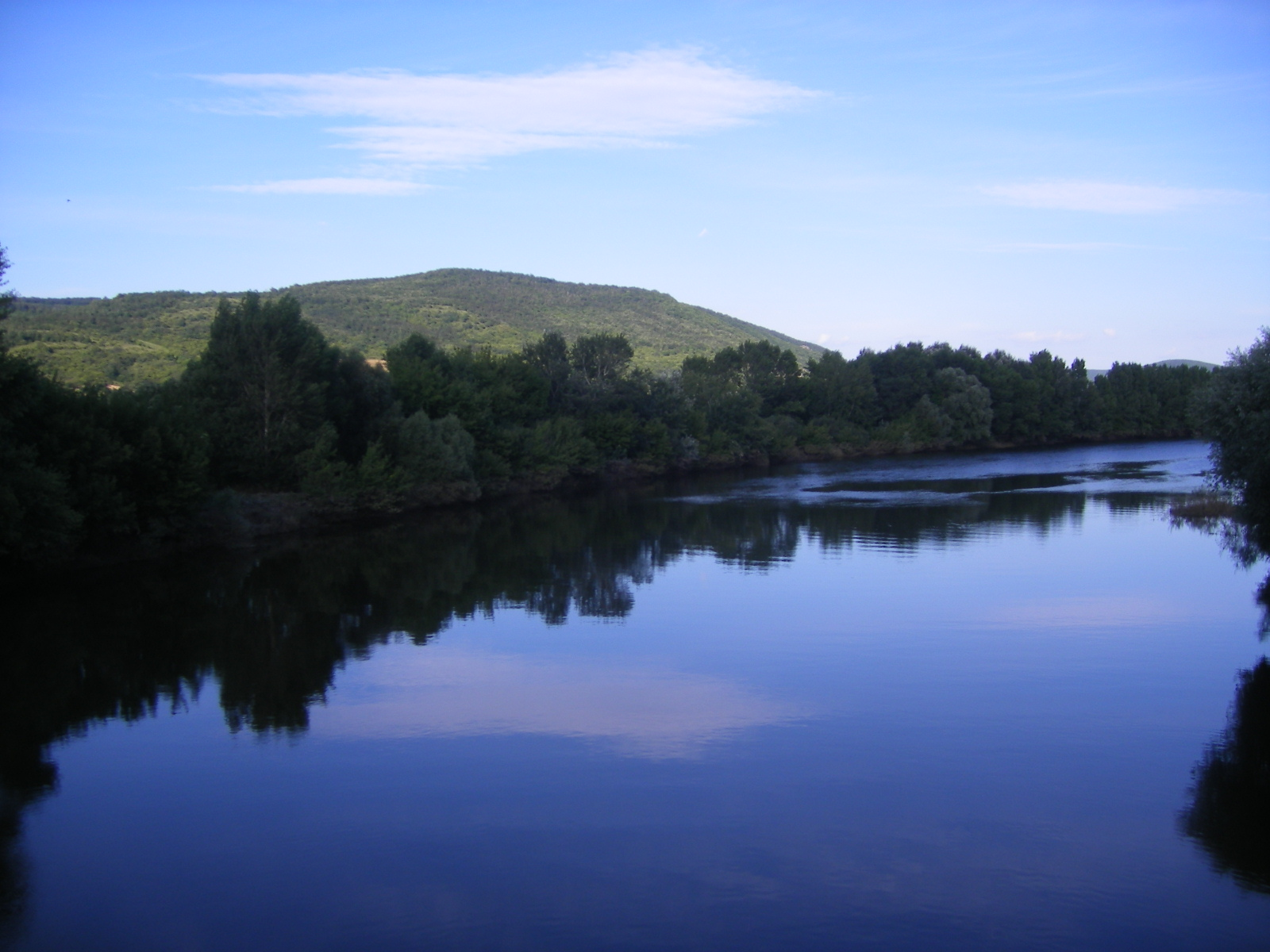 Garamkövesd - a Garam-folyó